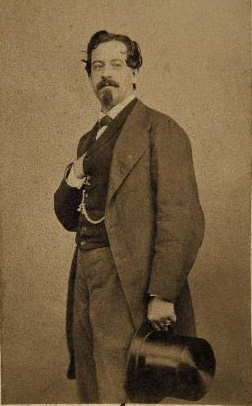 Ignacio Suárez Llanos, fotografía de J. Laurent, Museo de Historia de Madrid